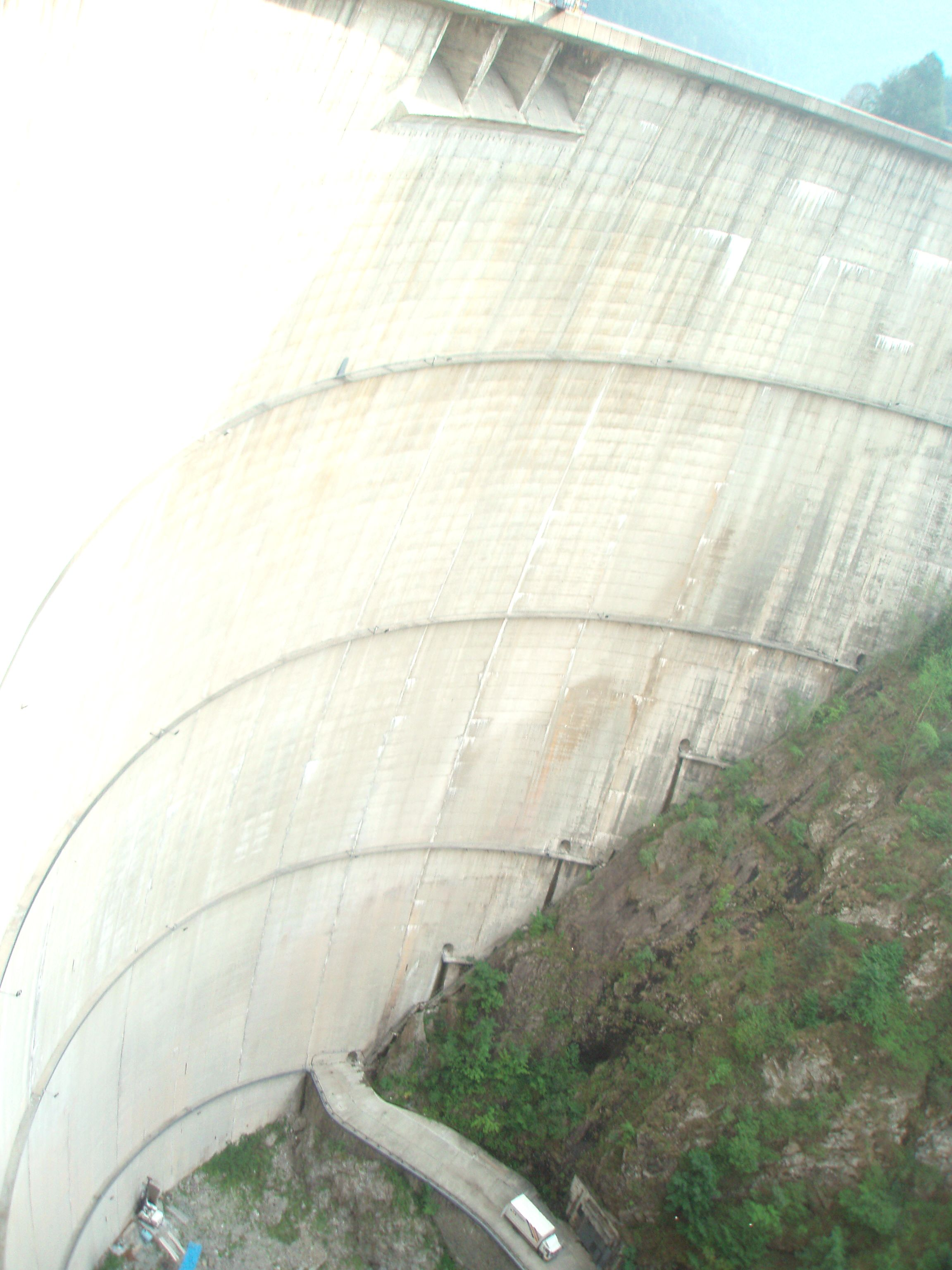 Romania-Vidraru dam